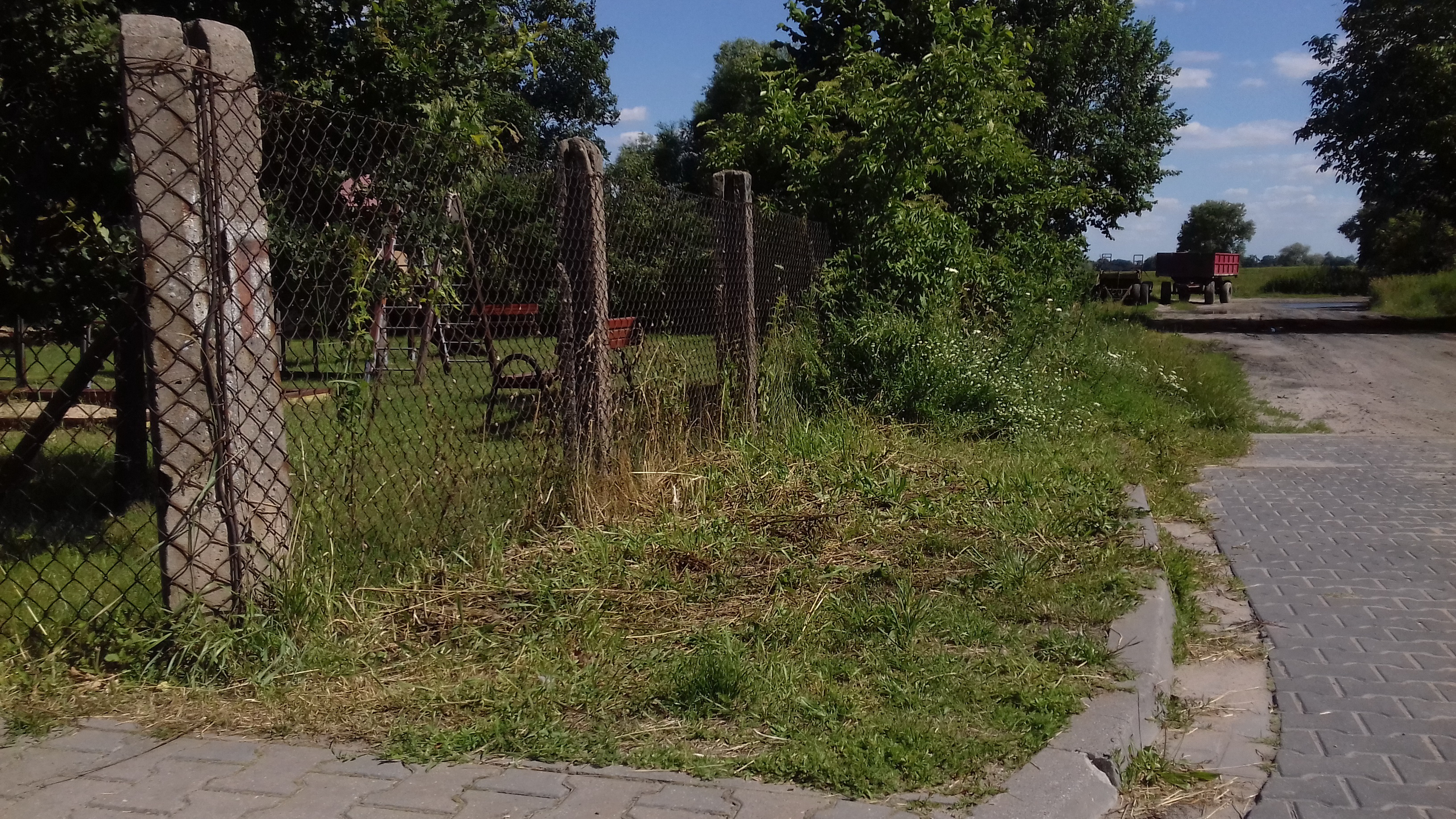 Oznaczenie szlaku pieszego nr 186 (czerwonego) w Rogalinku przy świetlicy wiejskiej